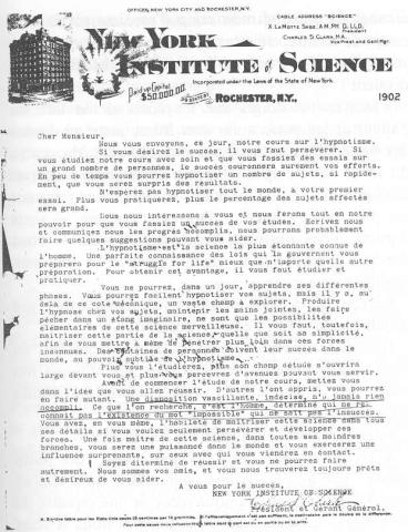 Cours d'hypnotisme par correspondance du New York Institute of Science, 1902. Source Grenier des grands parents de Michel Moine.